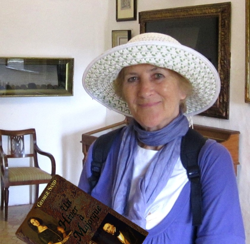 Beatrix Podolska, pedagog, muzykolog, Valldemossa 2011 Muzeum Fryderyka Chopina